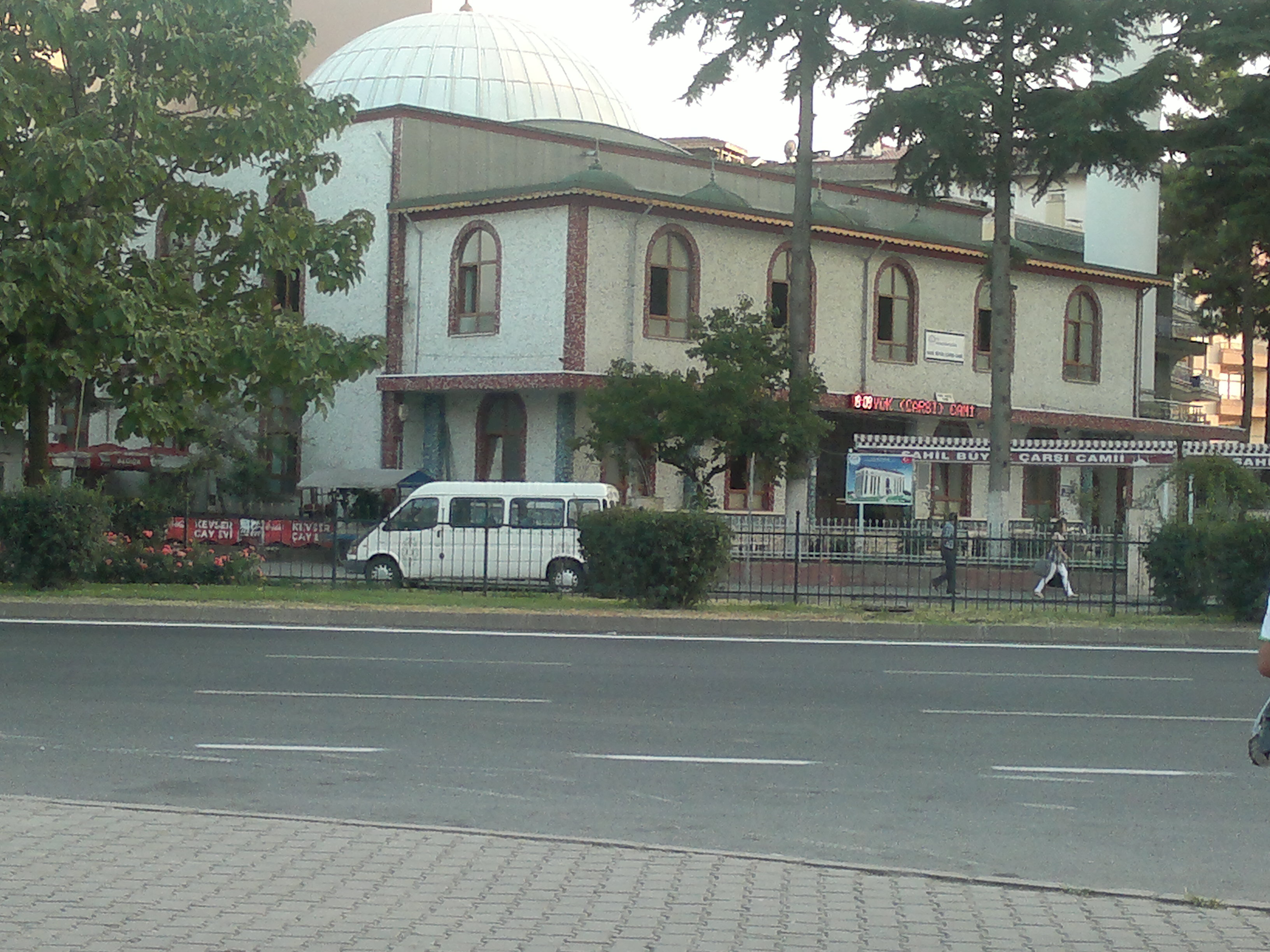 Fatsa Sahil Camii